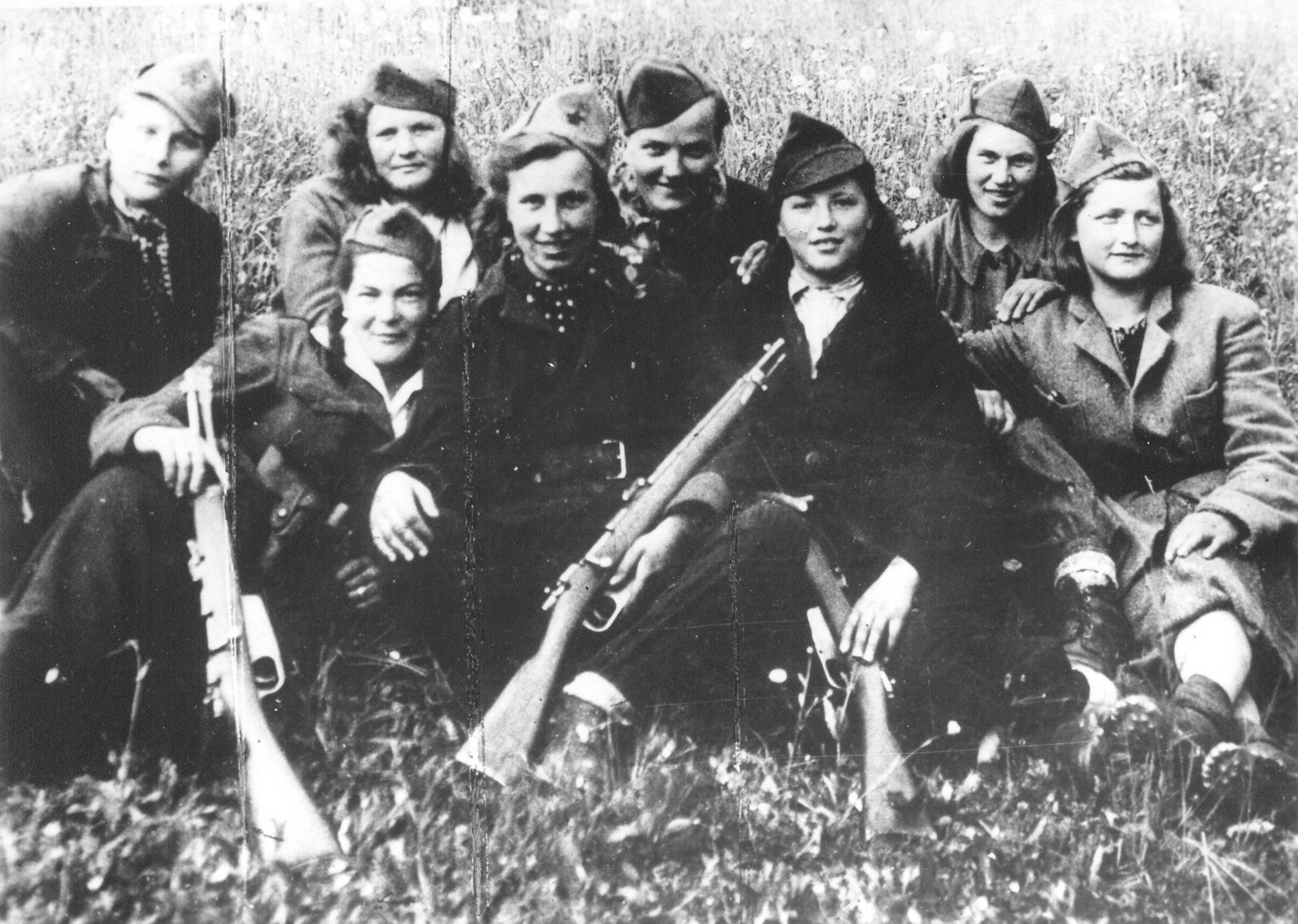 Borci Cankarjeve brigade na Čatežu.